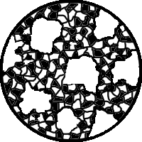 Gefügeschliffbild einer eutektikumsnahen Legierung mit „Primär-A“-Kristallen